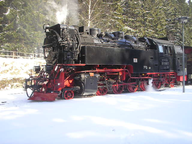 Brockenbahn im Schnee